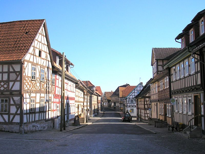 Ummerstadt (Landkreis Hildburghausen, Thüringen). Straßenzug in der historischen Altstadt. Eigene Aufnahme, April 2007 / Ummerstadt near Hildburghausen, (Thuringia, Germany). Part of the historic centre. Own photo, April 2007